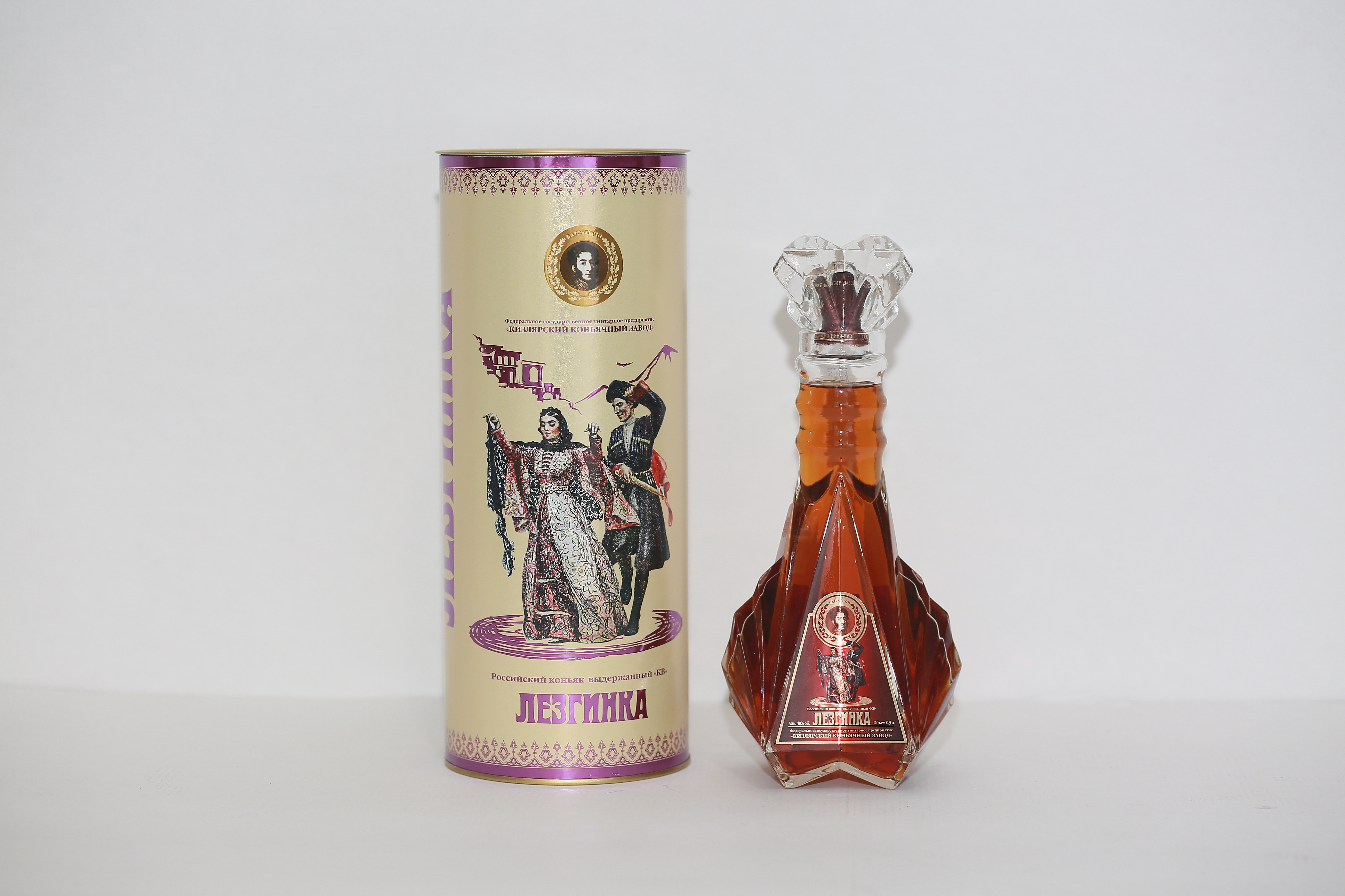 Кизлярский коньячный завод